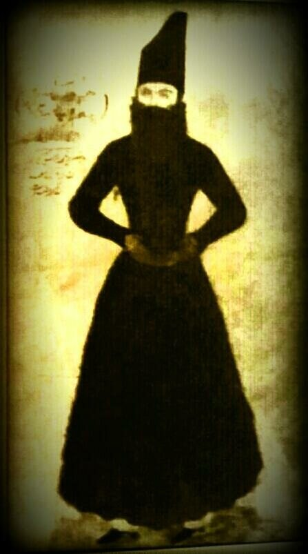 خان لرستان السابع ، علي مردان خان بن الحسين خان الثاني العلوي